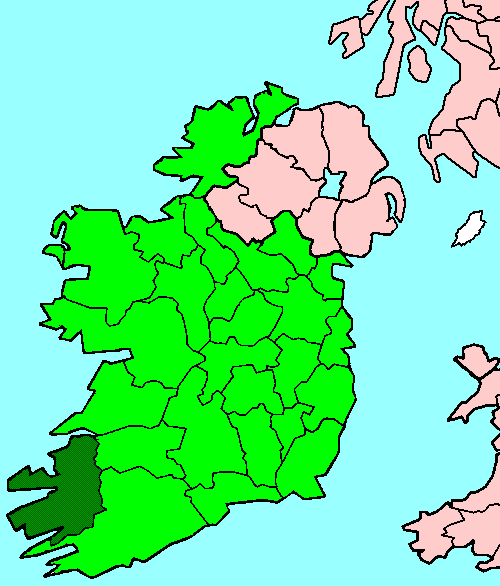 Kerry